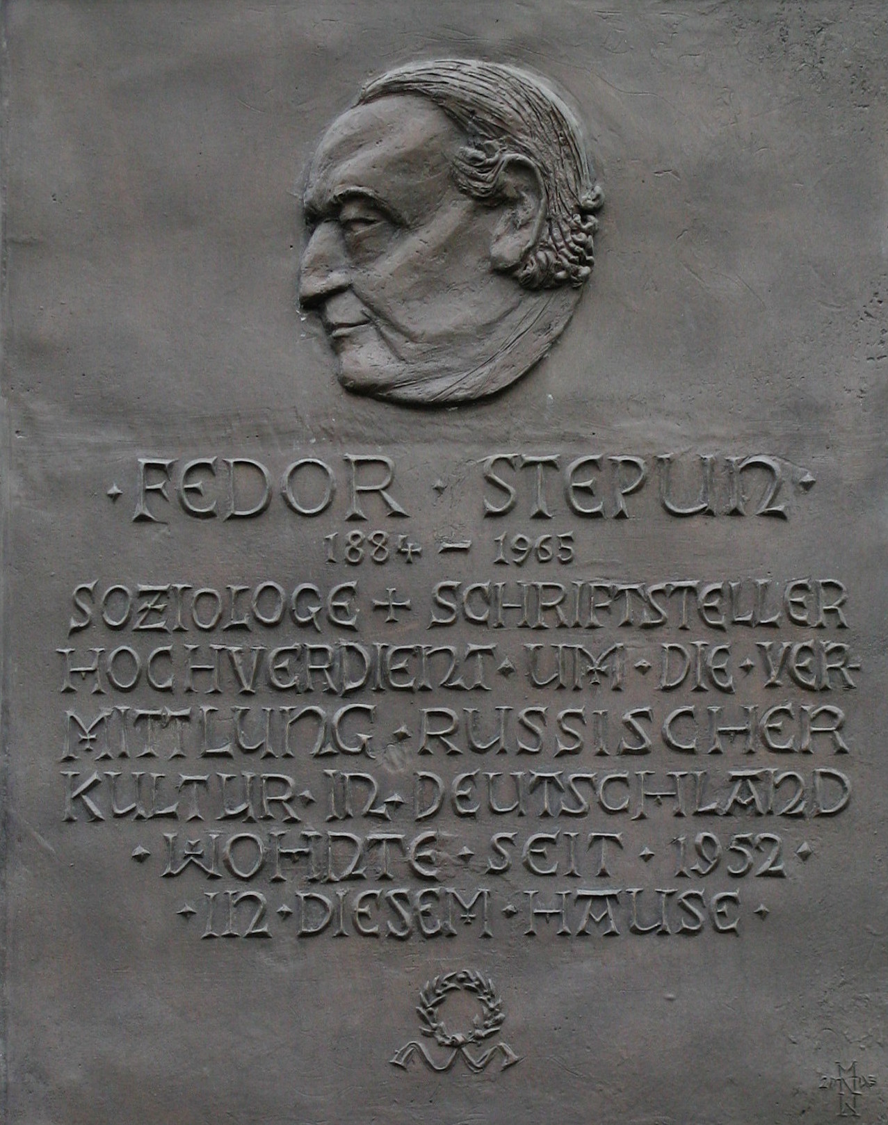 Fedor-Stepun-Gedenktafel am Haus Ainmillerstraße 30 in München-Schwabing; von Marlene Neubauer-Woerner